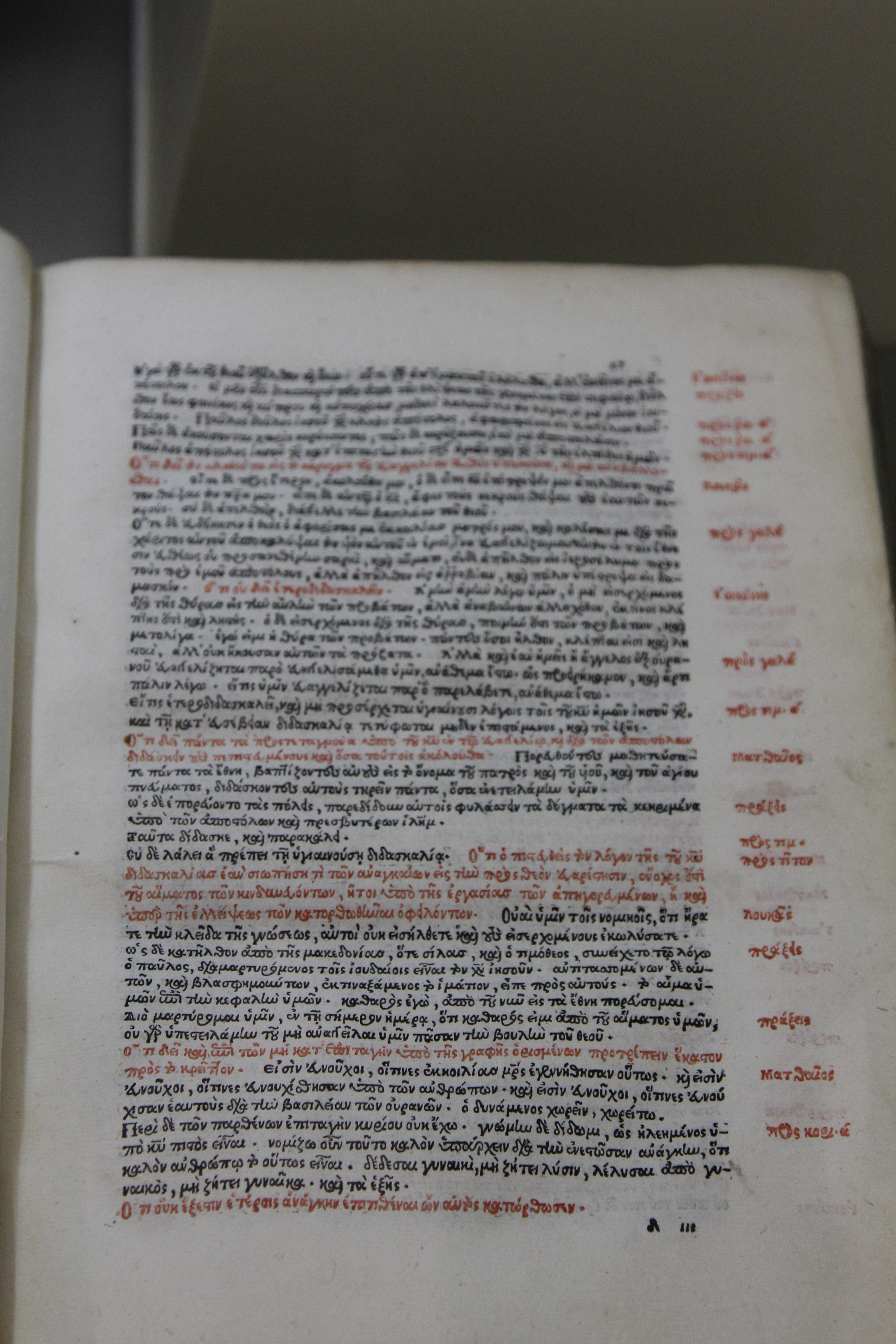 16th century leather binding from Venice. Decorative roll (roulette) has been used for the encaustic decoration of the frame and binding fibres. The central motif on the front consists of a depiction of the Crucifixion; the back cover features a potrayal of David. 'The Art of Bookbinding: From Byzantium to Contemporary Artistic Creation' (Sept. 2012 - Feb. 2013). Temporary exhibition. Byzantine and Christian Museum, Athens, Greece. --- Δερματόδετη βενετσιάνικη στάχωση του 16ου αιώνα με έγκαυστη διακόσμηση από ρουλέτα στο πλαίσιο και νεύρα στη ράχη. Κεντρικά μοτίβα με παράσταση της Σταύρωσης και του Δαβίδ στο εμπρόσθιο και οπίσθιο κάλυμμα. "Η Τέχνη της Βιβλιοδεσίας. Από το Βυζάντιο στη Σύγχρονη Εικαστική Δημιουργία" Σεπ 2012 - Φεβ. 2013. Περιοδική έκθεση. Βυζαντινό και Χριστιανικό Μουσείο, Αθήνα.